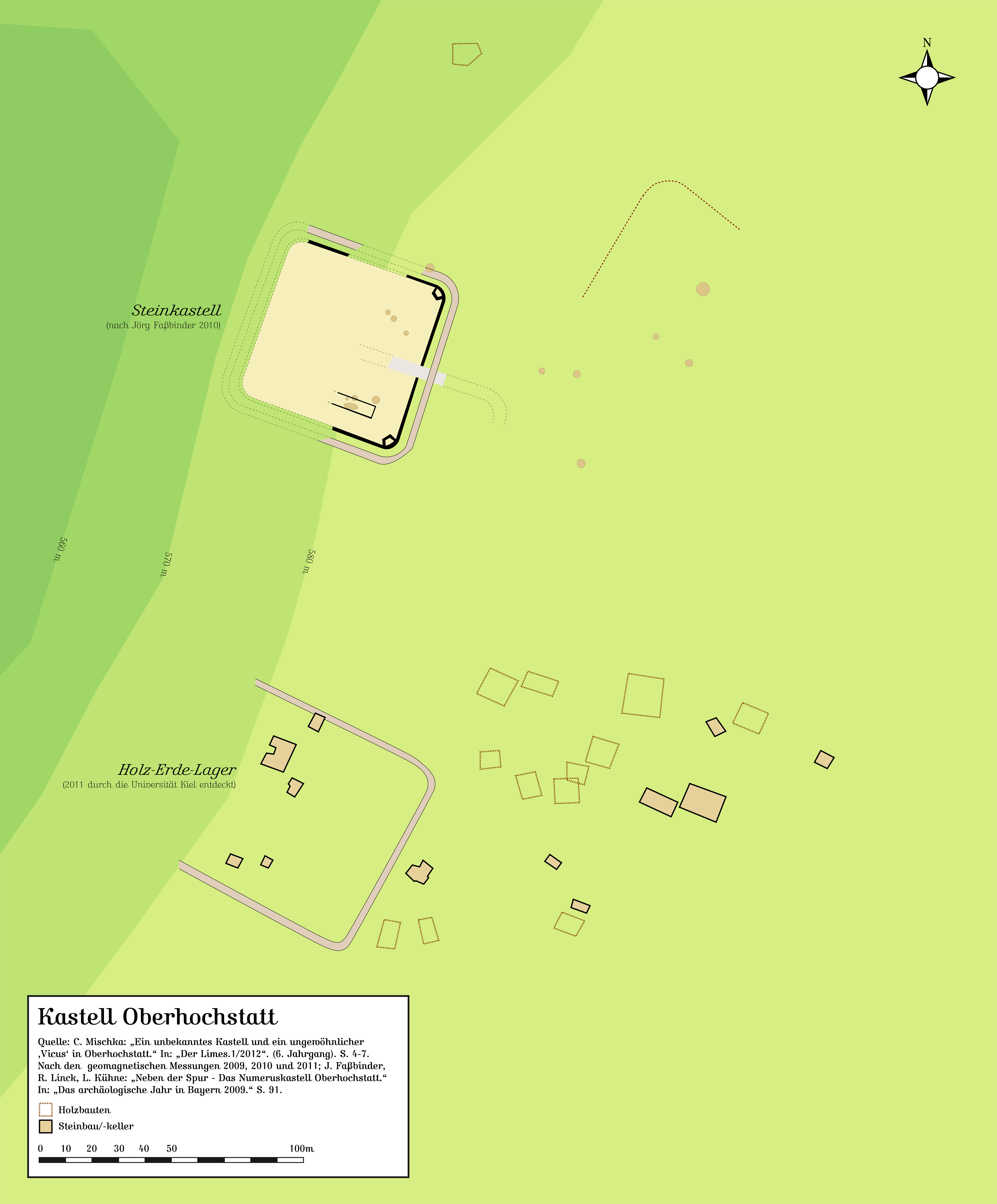 Raetischer Limes, Bayern: Kastell und Vicus Oberhochstatt nach den bis 2011 aufgenommenen Befunden. Die Quellen sind direkt in der Datei angegeben!